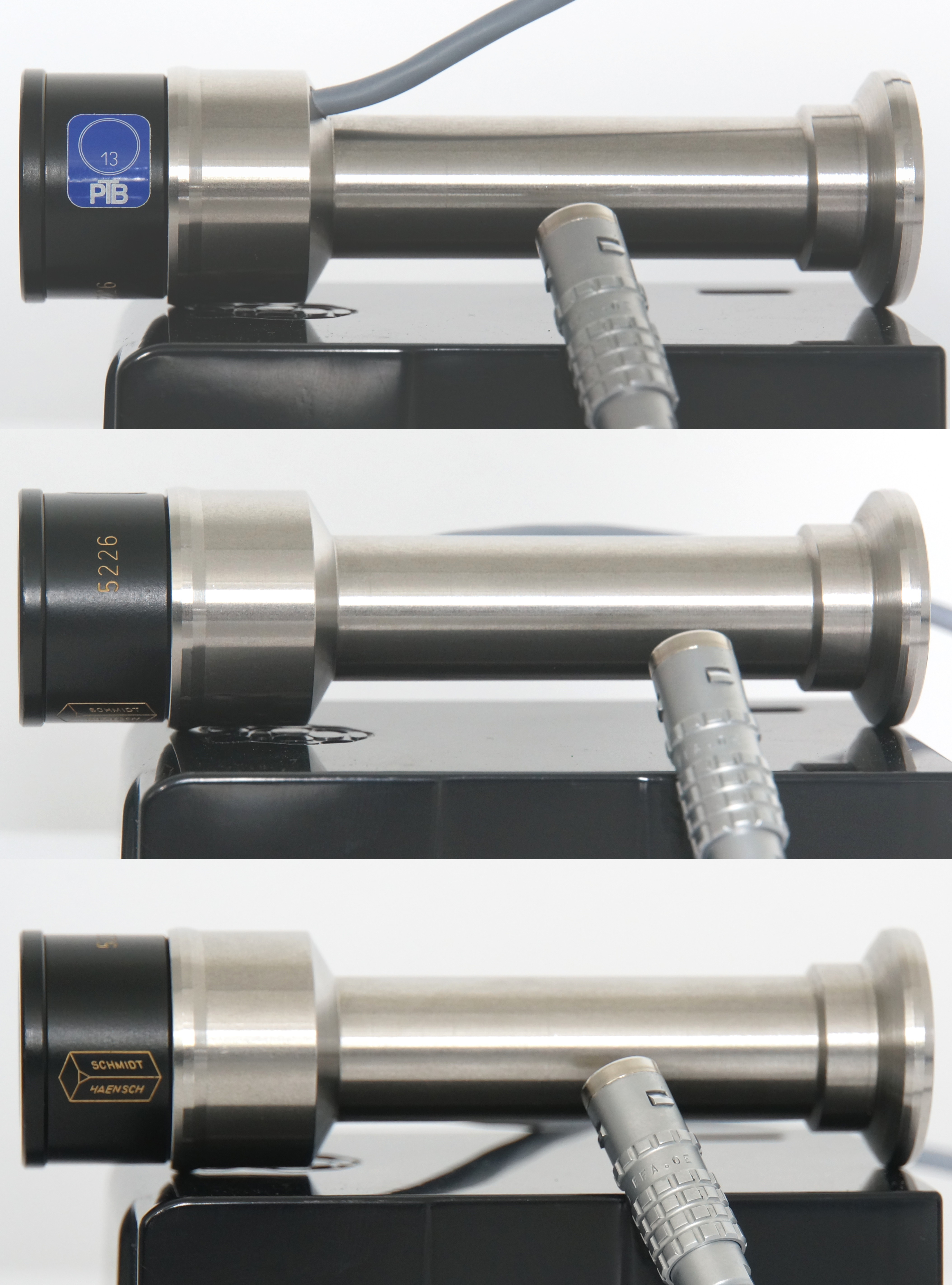 Von der PTB für den Polarimeter-Hersteller Schmidt + Haensch zerifizierte Quarzkontrollplatte